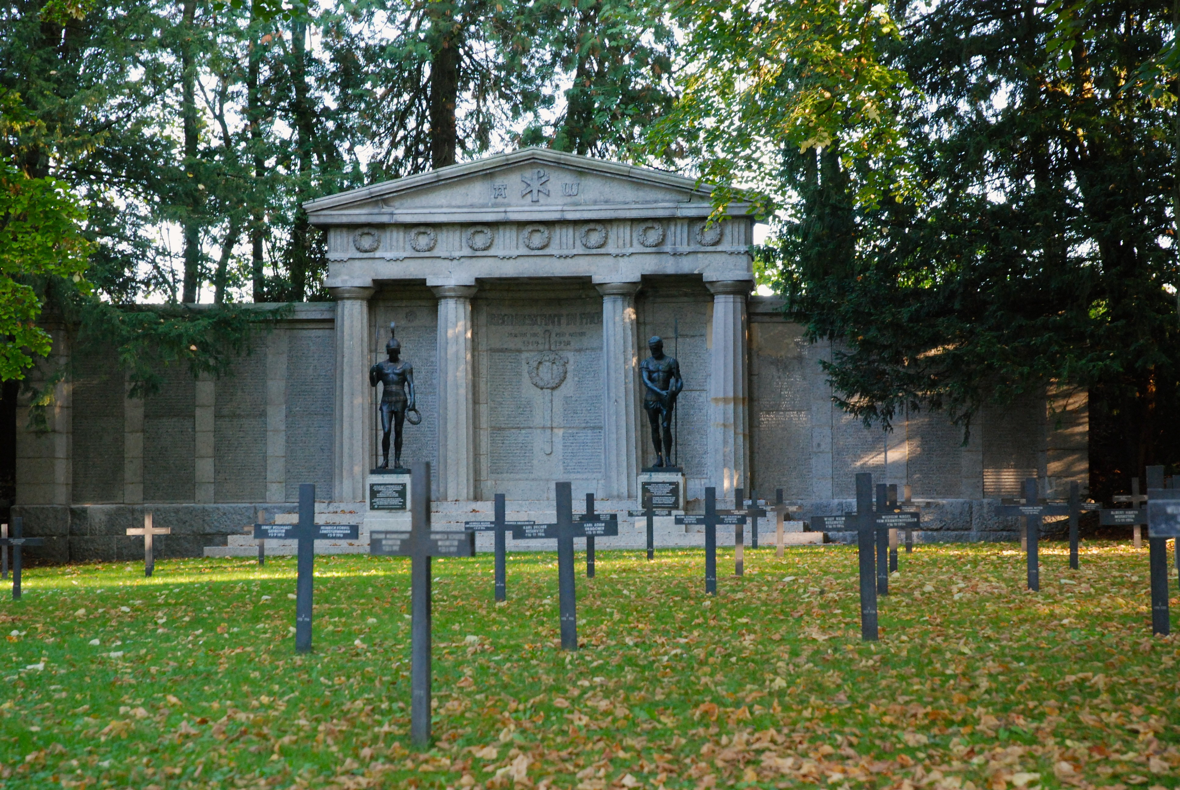 monument du cimetière allemand de Saint Quentin Aisne (sculpteur Wilhelm Wandschneider)